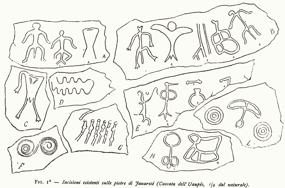 Desenhos rupestres reproduzidos por Ermanno Stradelli, encontrados junto ao rio Uaupés, afluente do rio Negro, e publicado na revista da Società Geografica Italiana de 1890.